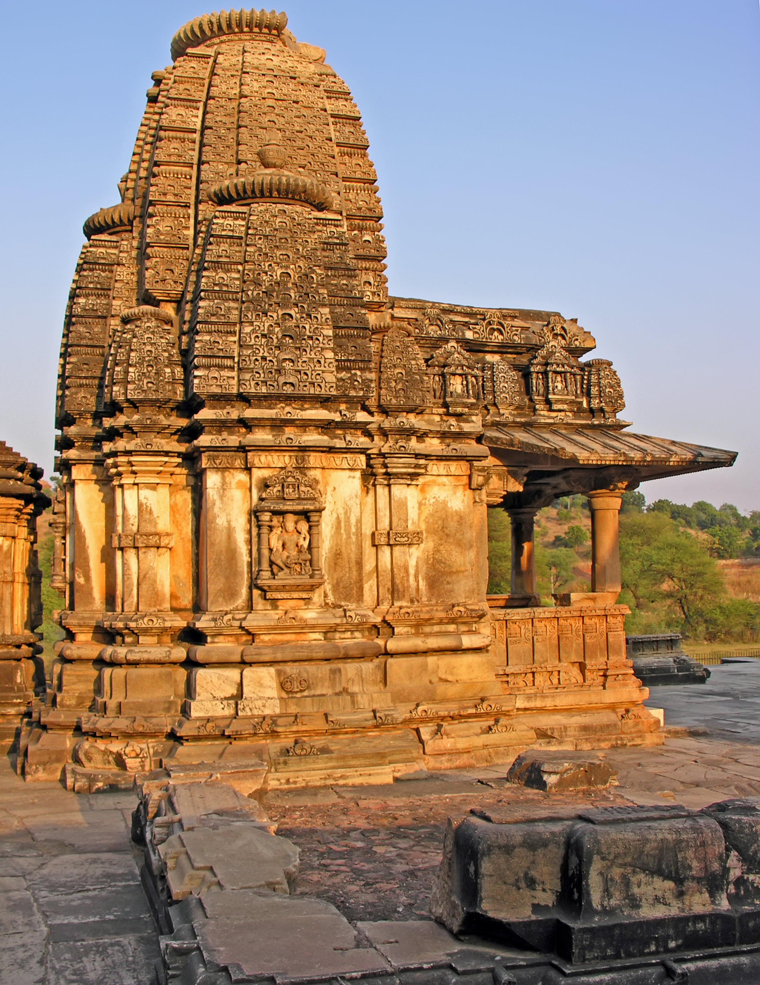 Sas Bahu Temple, Eklingji, India